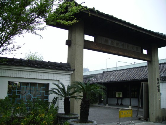 中文（台灣）: 逸仙公園入口。